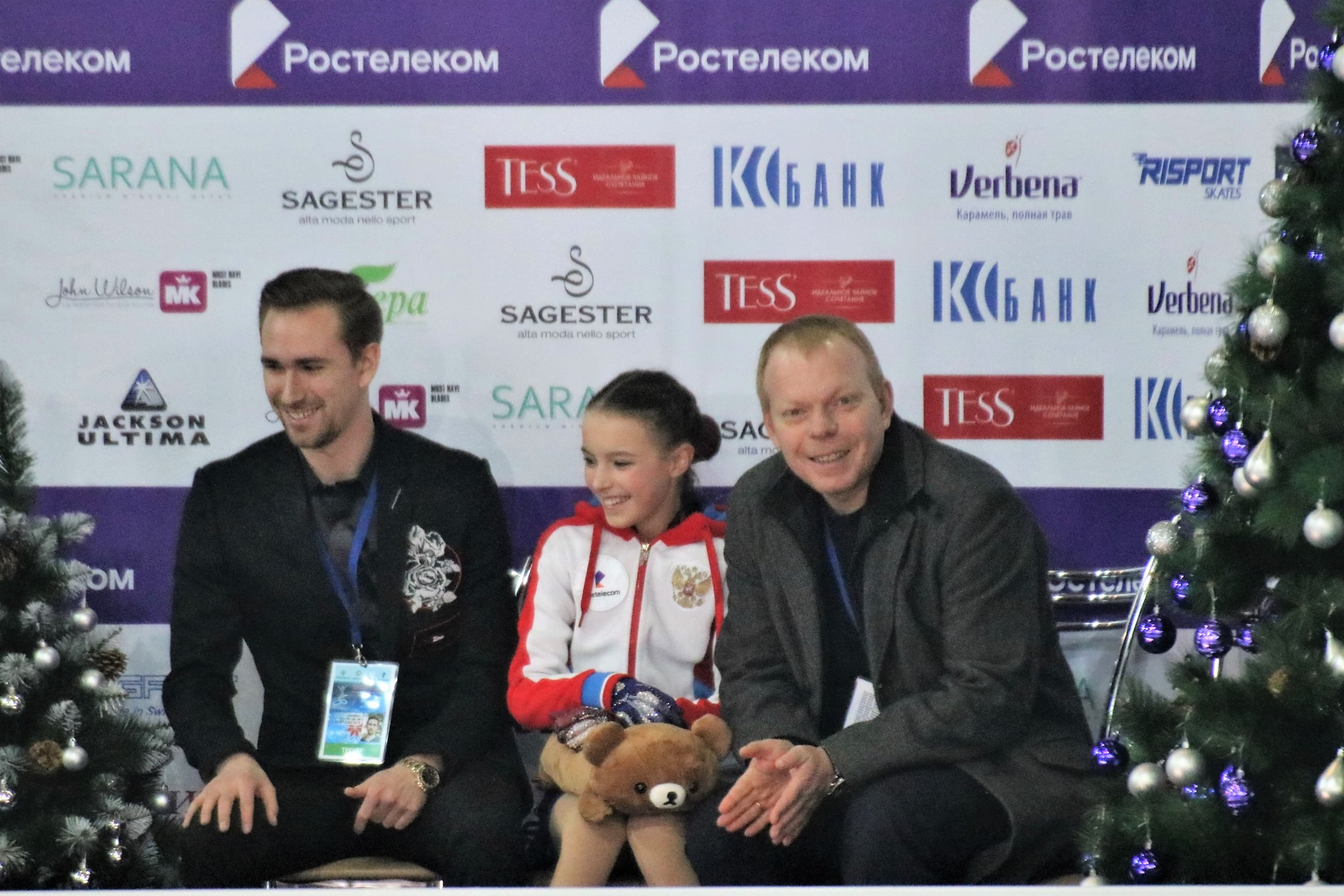 Анна Щербакова с Даниилом Глейхенгаузом (слева) и Сергеем Дудаковым (справа) на чемпионате России по фигурному катанию на коньках 2019